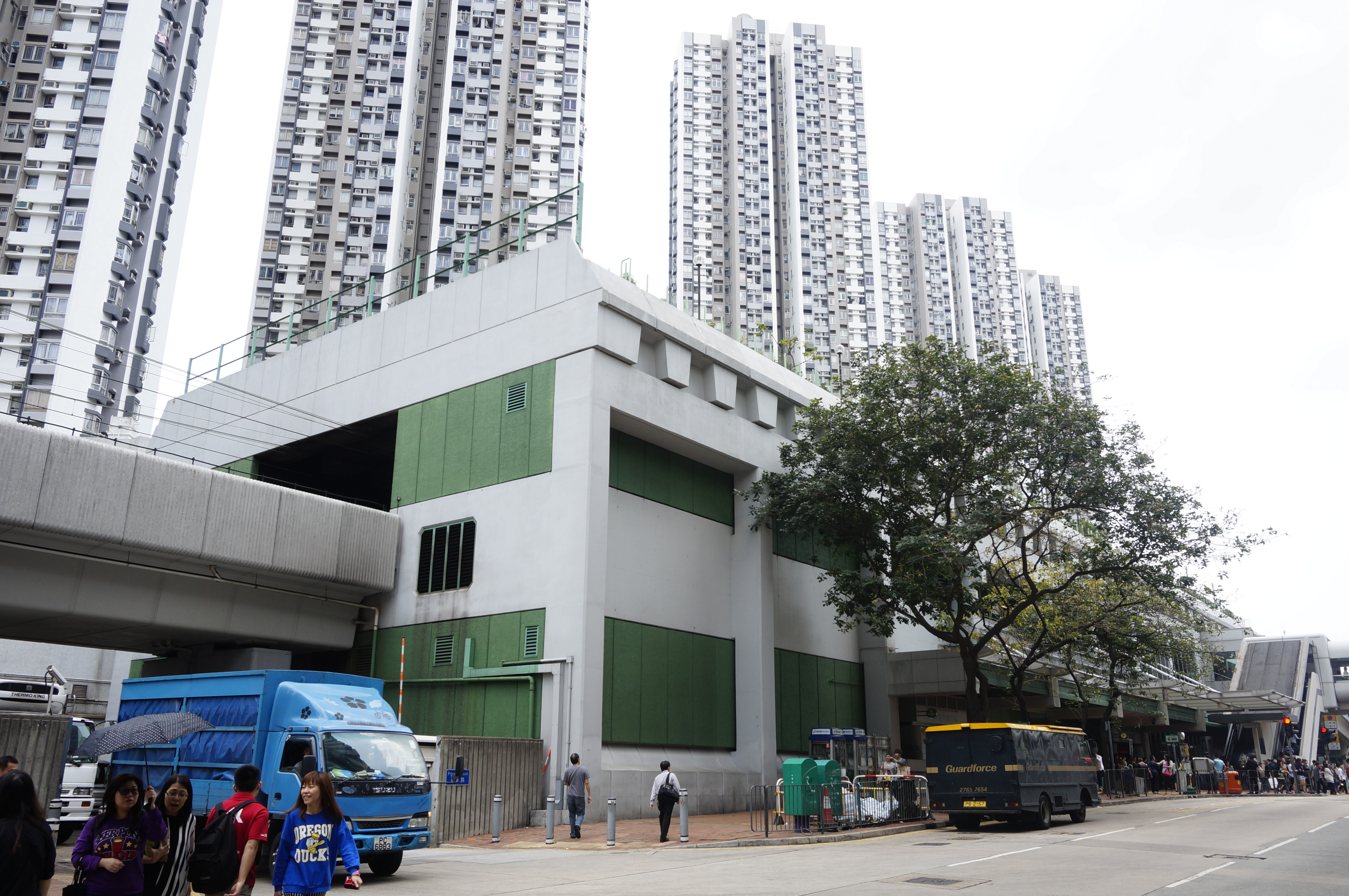 港鐵葵芳站外貌